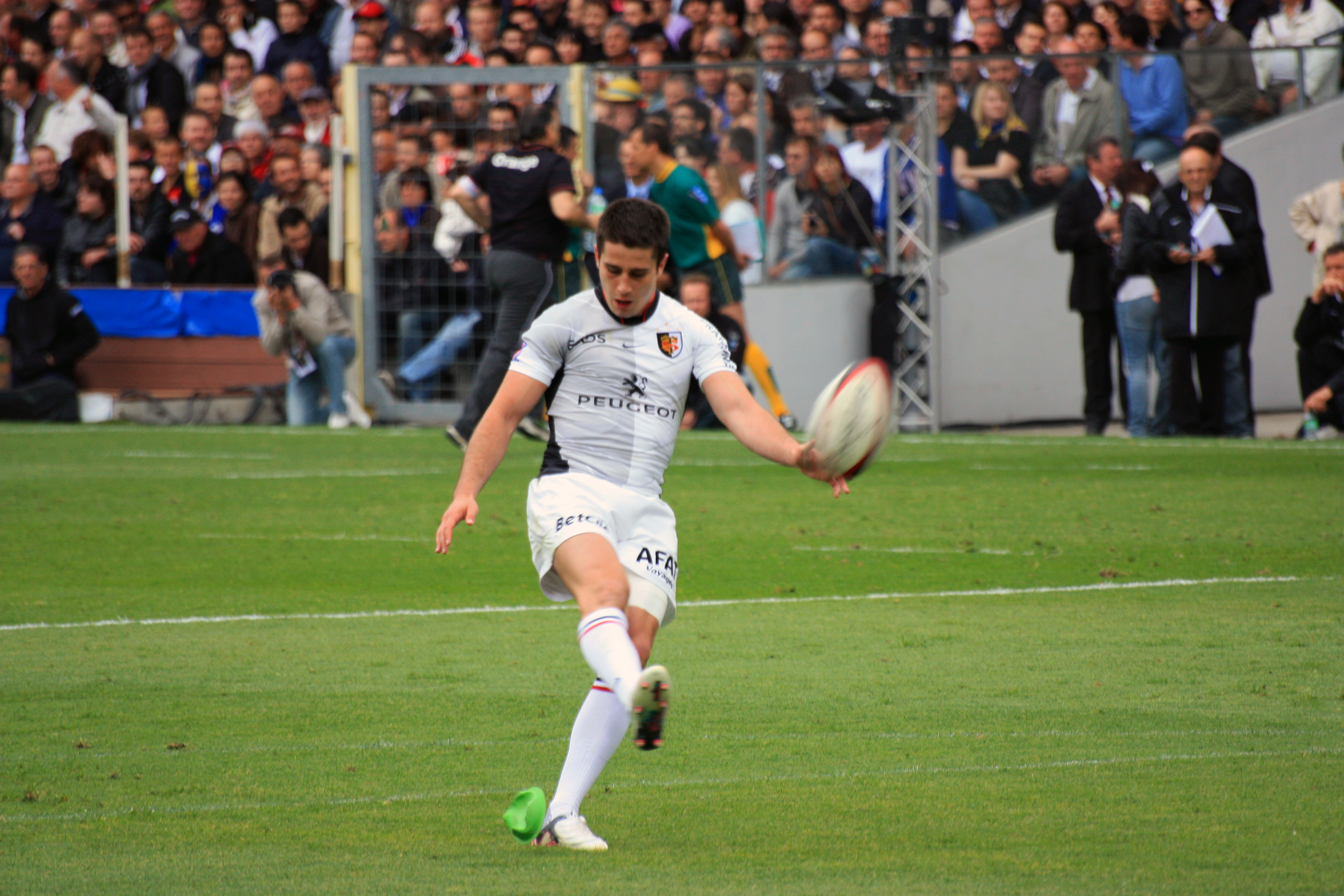 Transformation de Nicolas Bézy contre l'ASM Clermont Auvergne